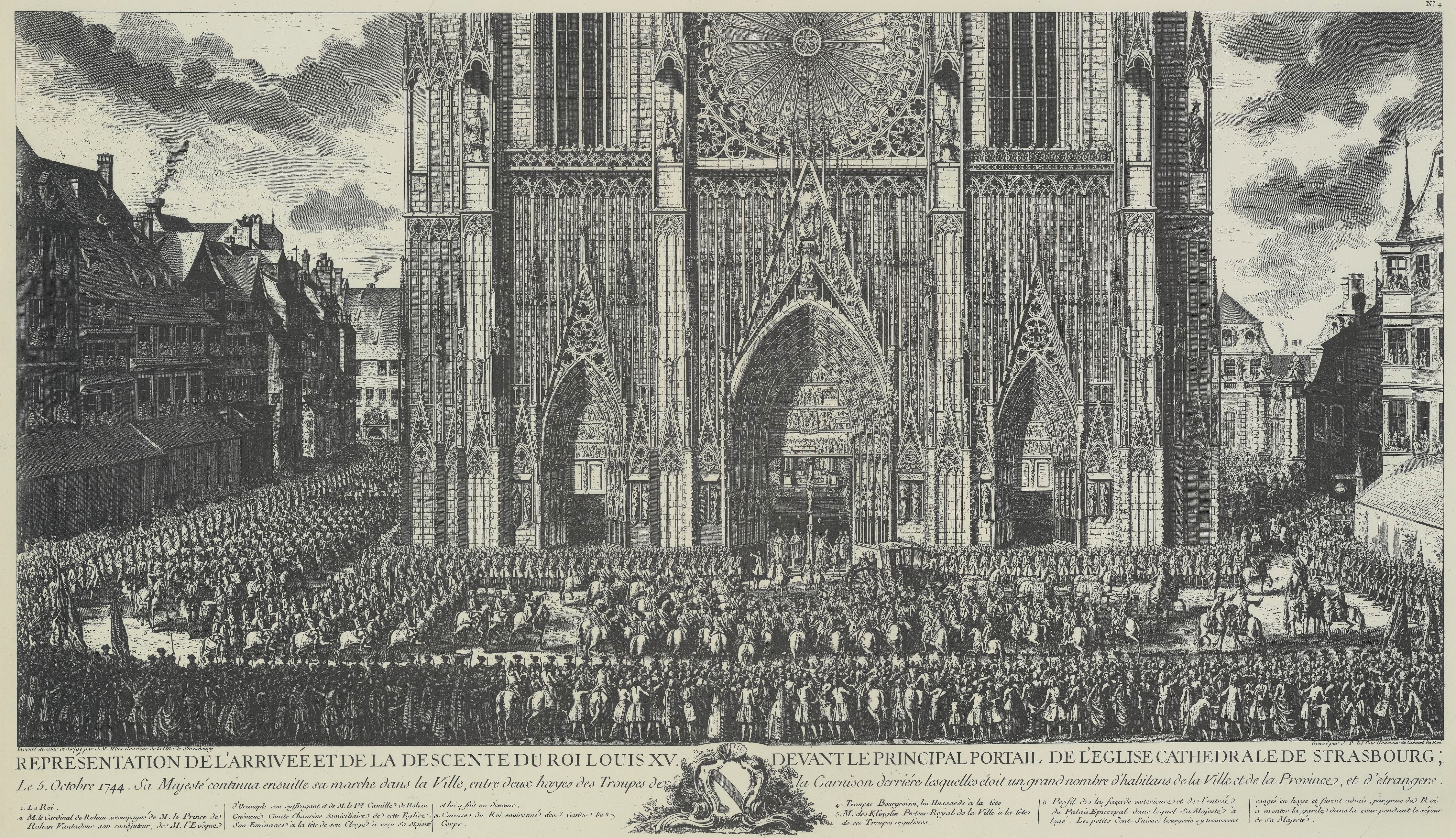 Représentation de l'arrivée de la descente du roi Louis XV devant le principal portail de l'église cathédrale de Strasbourg. Bibliothèque nationale et universitaire de Strasbourg